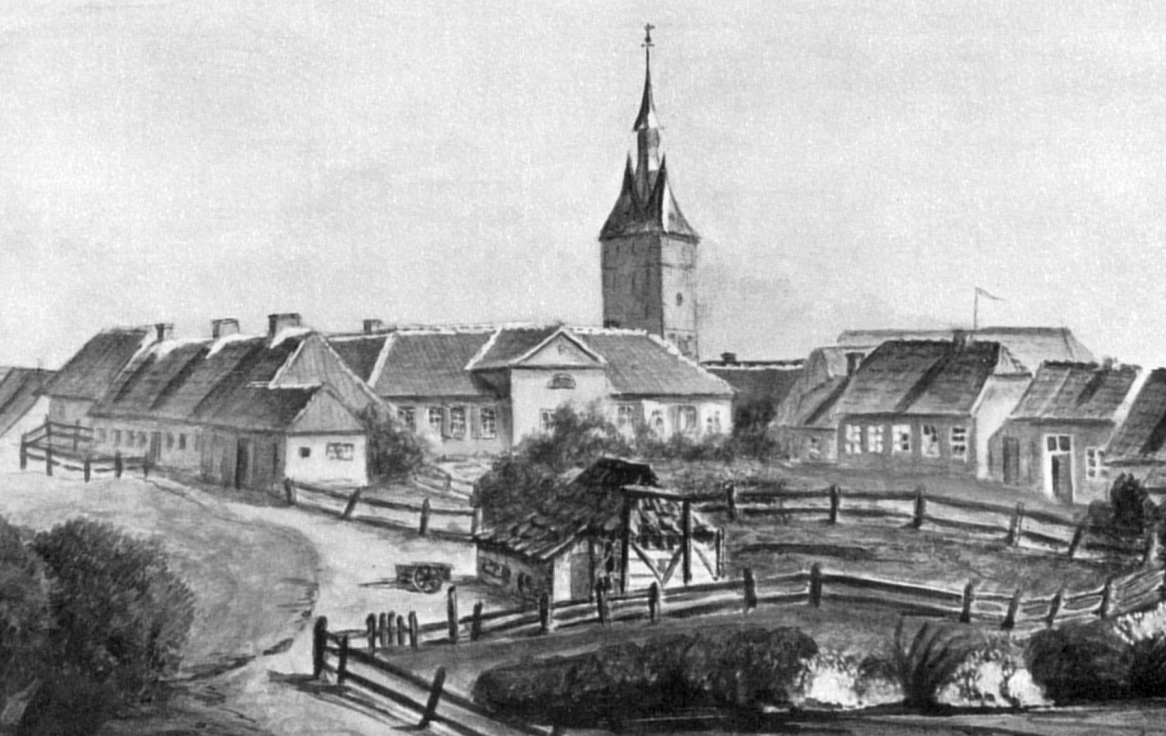 Westturm Wangerooge und altes Inseldorf mit Logierhaus in der Bildmitte